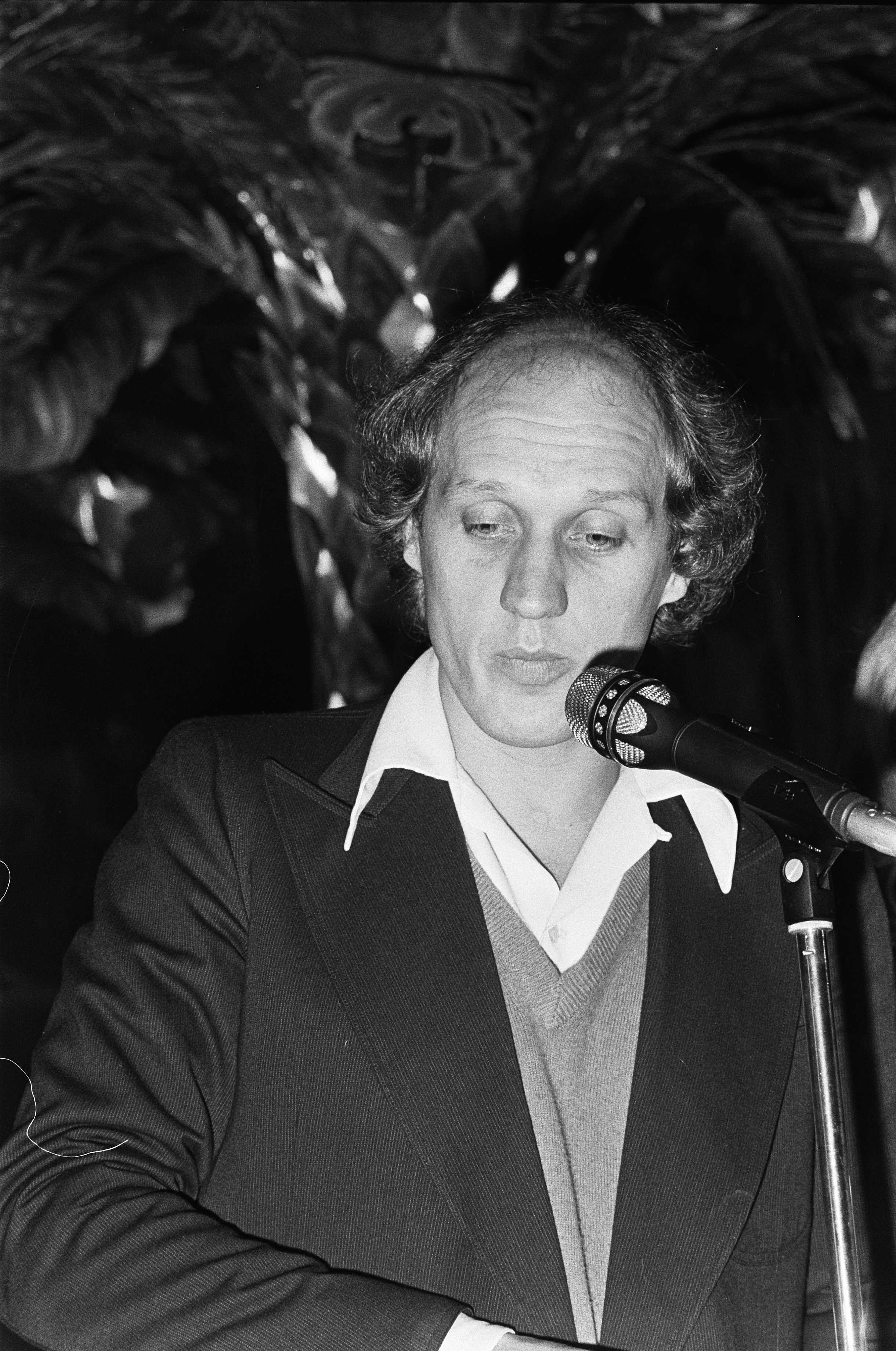 Collectie / Archief : Fotocollectie Anefo Reportage / Serie : Uitreiking Louis Davidsprijs aan Herman van Veen en tekstschrijver Eric v.d. Wurff voor hun liedje "Opzij" Beschrijving : Herman van Veen Datum : 30 november 1979 Locatie : Amsterdam/Noord-Holland Trefwoorden : portretten, prijsuitreikingen, zangers Persoonsnaam : Veen, Herman van Fotograaf : Croes, Rob C. / Anefo, [onbekend] Auteursrechthebbende : Nationaal Archief Materiaalsoort : Negatief (zwart/wit) Nummer archiefinventaris : bekijk toegang 2.24.01.05 Bestanddeelnummer : 930-5661 Reacties Geplaatst door Maaike op 27 augustus 2012 - 22:54. Louis Davidsprijs van de Stichting Conamus voor Herman van Veen en Erik van der Wurff voor hun lied 'Opzij'.